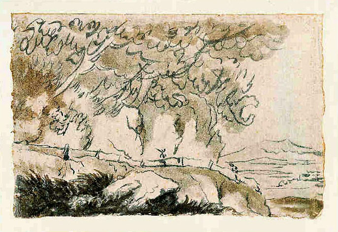 Die Solfatara von Pozzuoli, Pinselzeichnung mit Sepia und Tusche. 280x435mm, NFG/GNM Corp.II,87